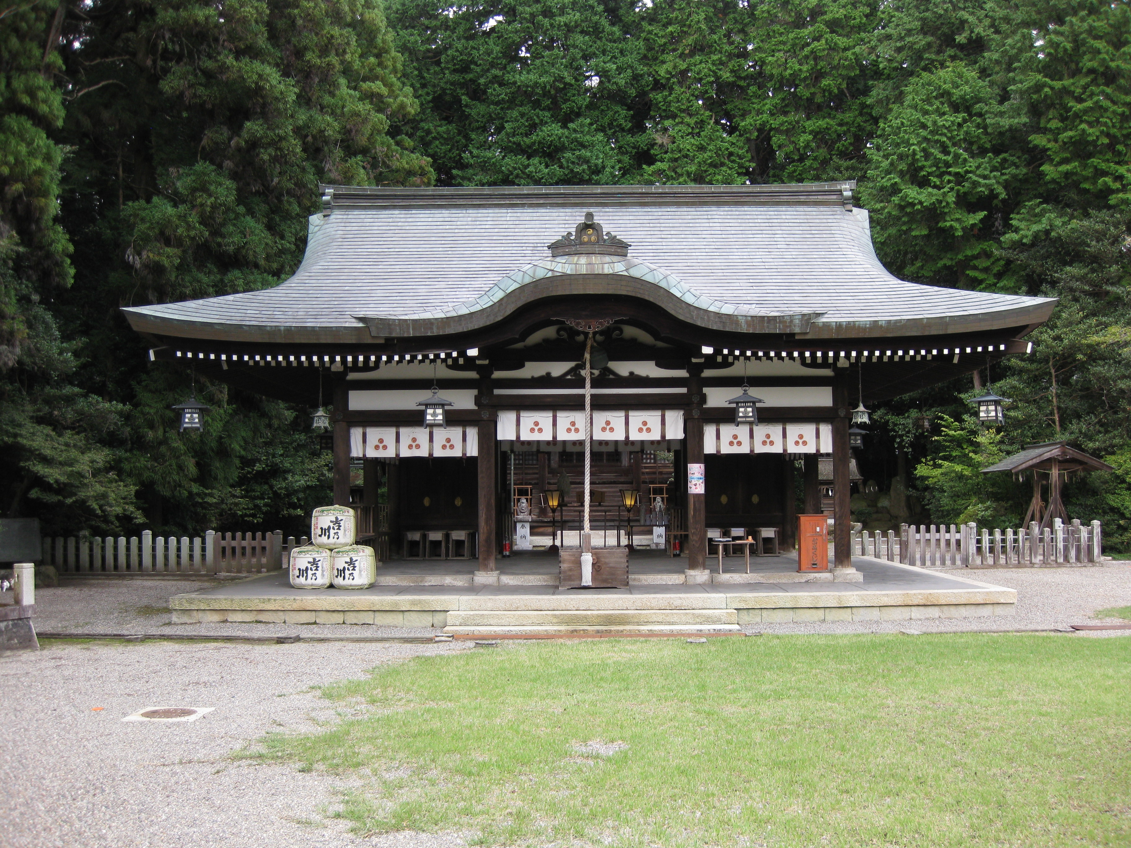 押立神社本殿